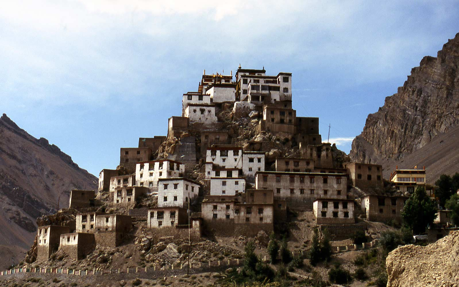 Ki Gompa in der Nähe von Kibber, Spiti, Himachal Pradesh, Indien